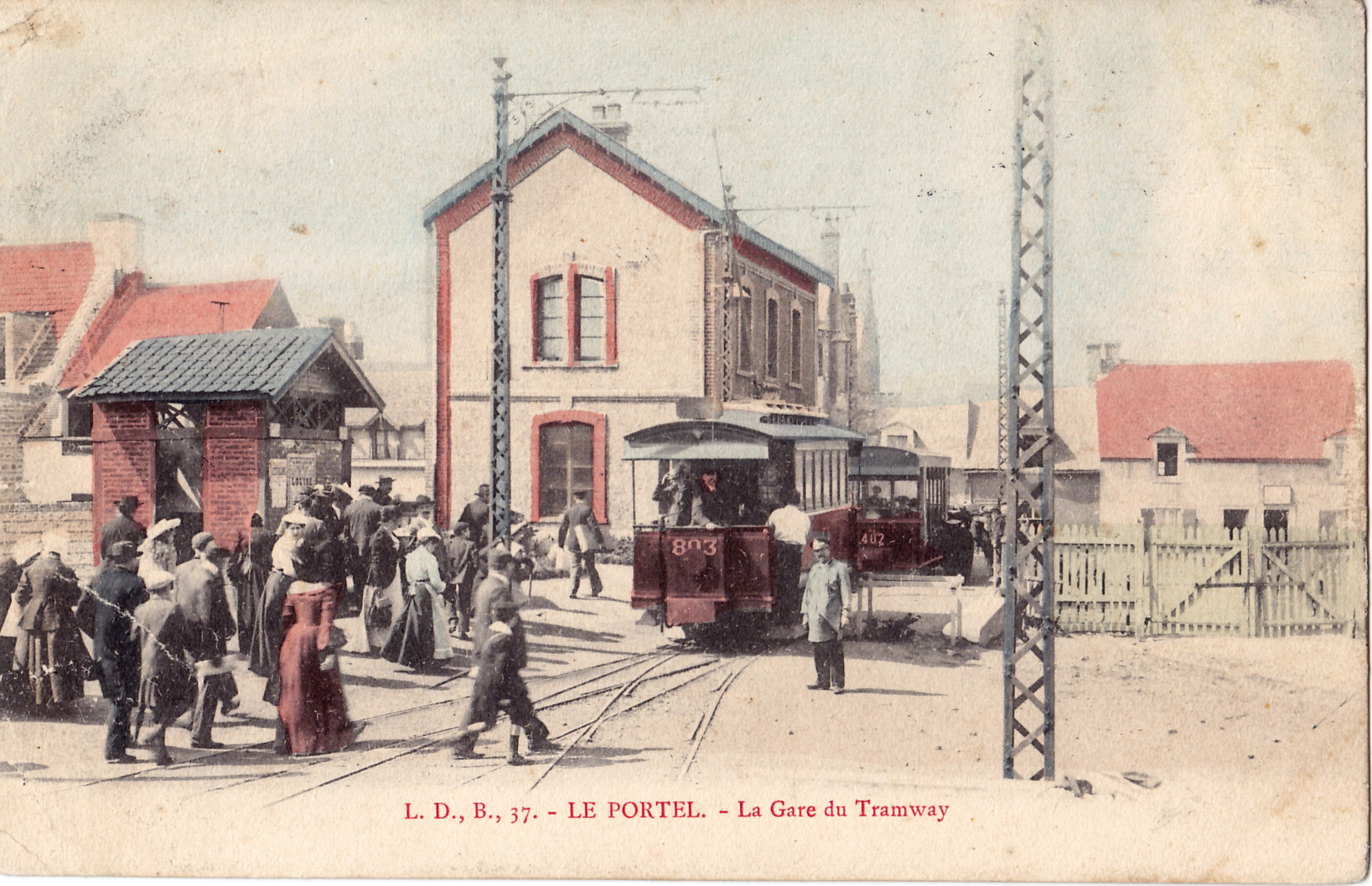 Carte postale ancienne éditée par L. D., B., n°37 :LE PORTEL - La Gare du Tramway